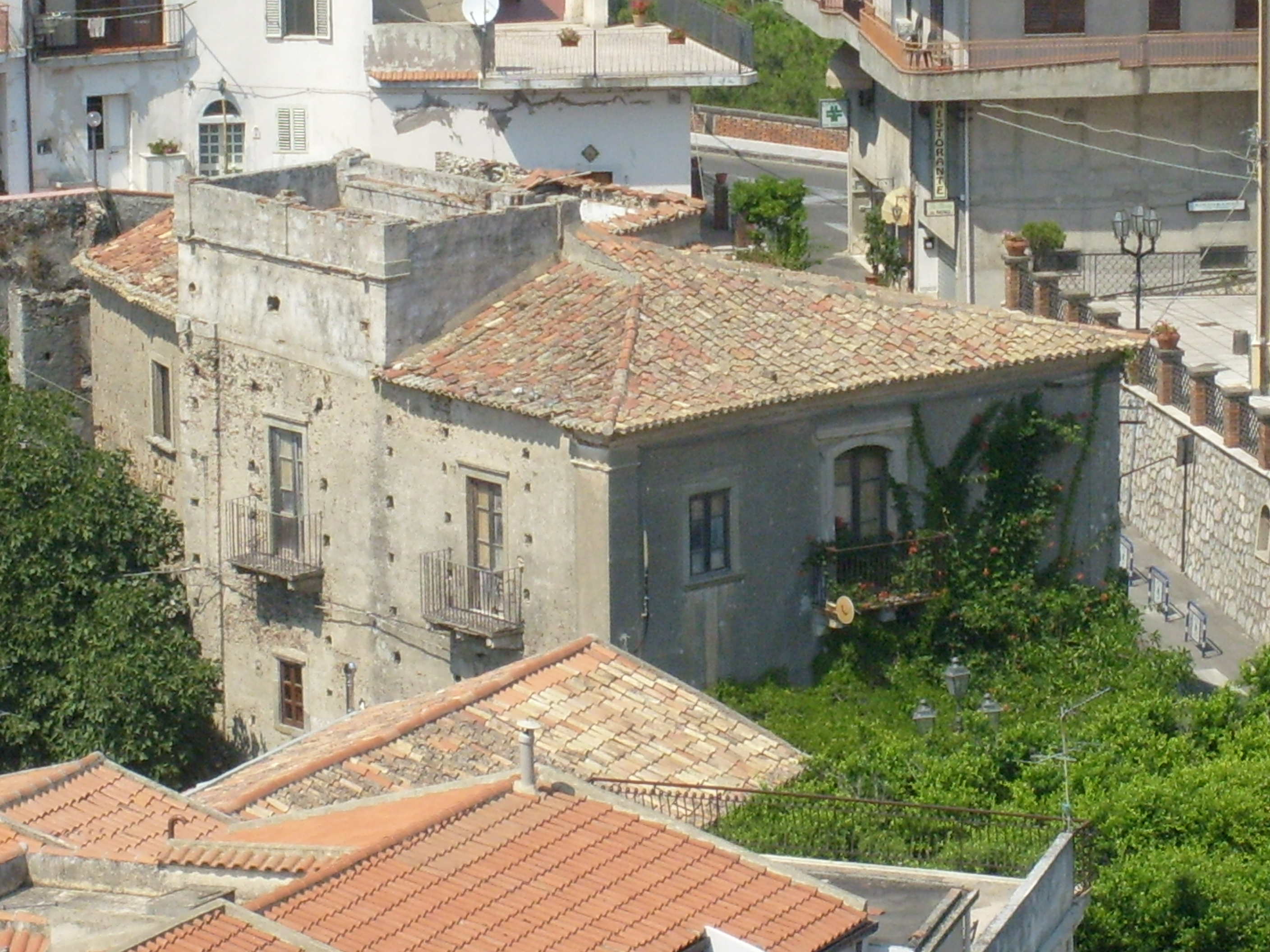 il settecentesco Palazzo Trimarchi di Savoca